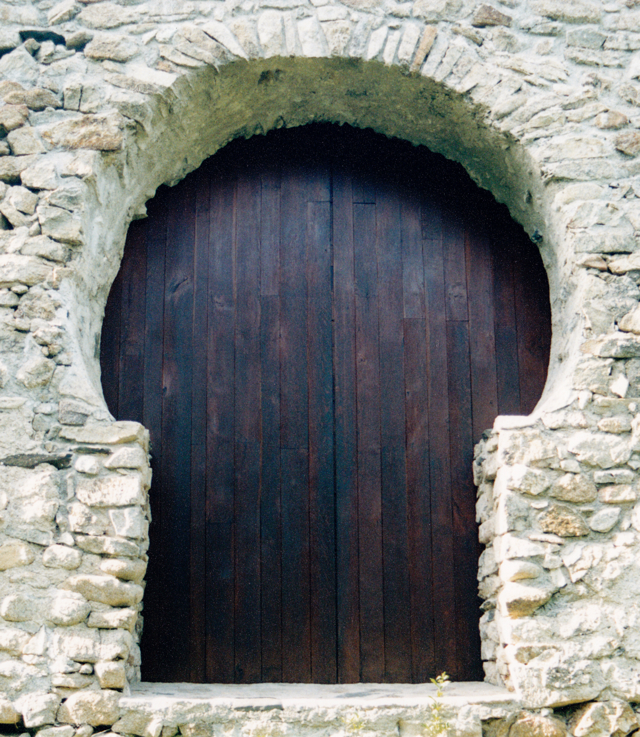 France - Fenouillèdes - Saint-Michel de Sournia (préroman) : portail méridional